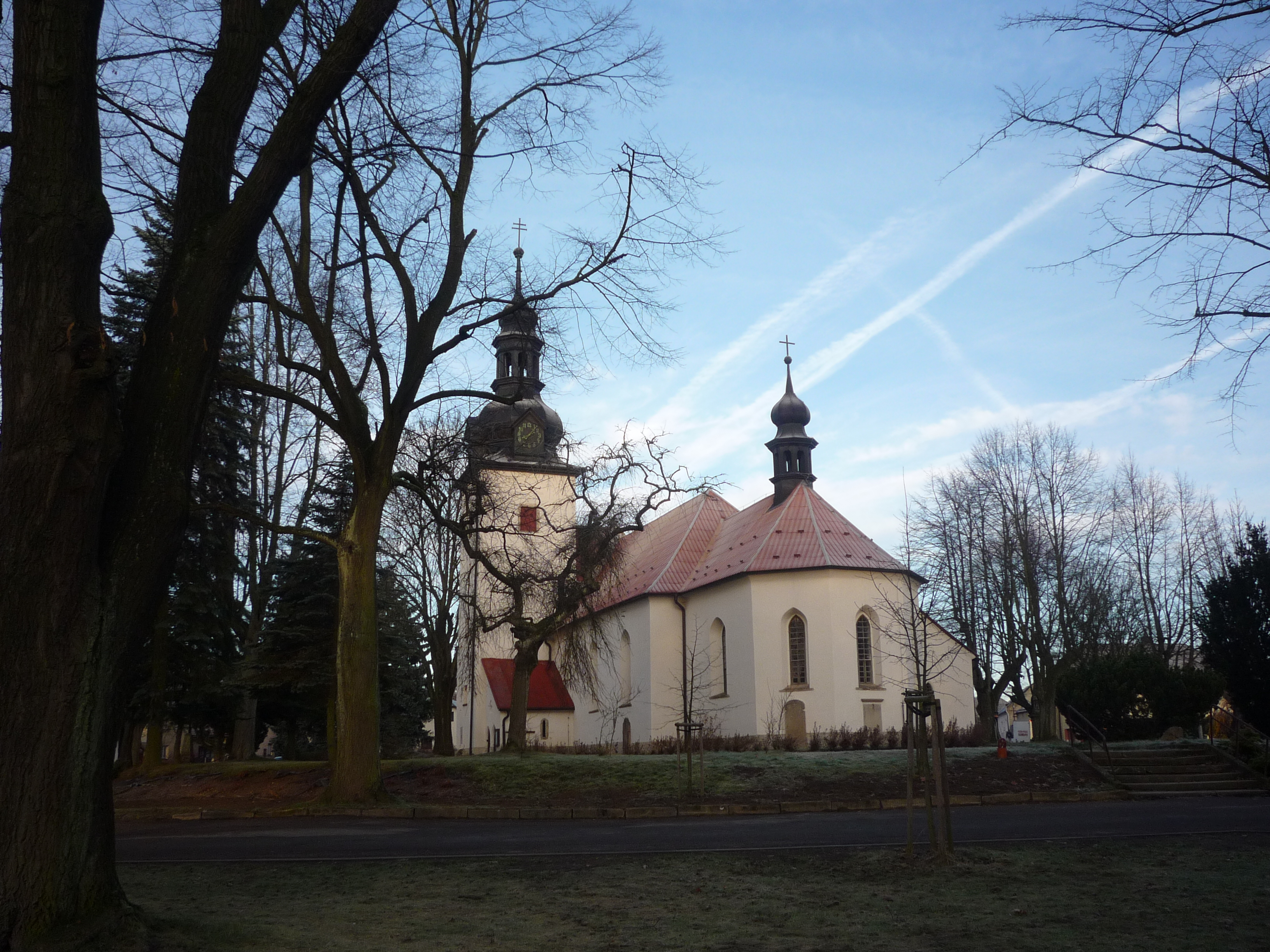 Kostel sv. Jakuba Většího. Původně gotický kostel se prvně zmiňuje r. 1372. R. 1602 přestavěn (pozdní gotika), r. 1754 opravena věž, r. 1761 byl kostel obnoven. R. 1816 vyhořel, opraven r. 1845 a znovu v l. 1913, 1922 a 1970. Z obd. gotiky se zachovala 2 patra věže a část jižní předsíně. R. 1993 byly v kostele objeveny fresky.Štoky. Okr.Havlíčkův Brod. Kraj Vysočina. Czech Republic.